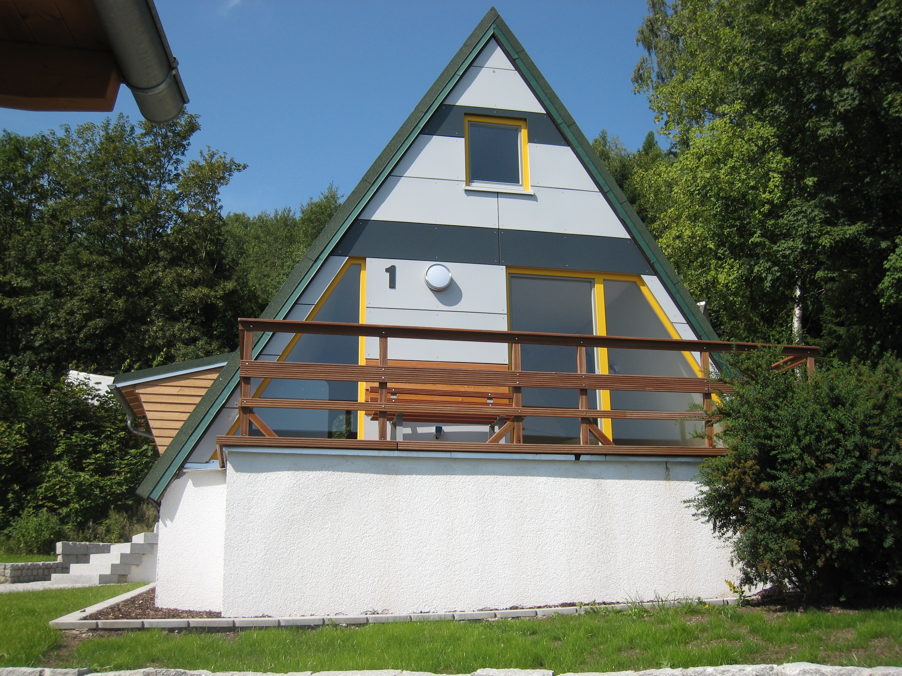 Event- und Tagungszentrum Miavojo in Oehrenstock, Langewiesen